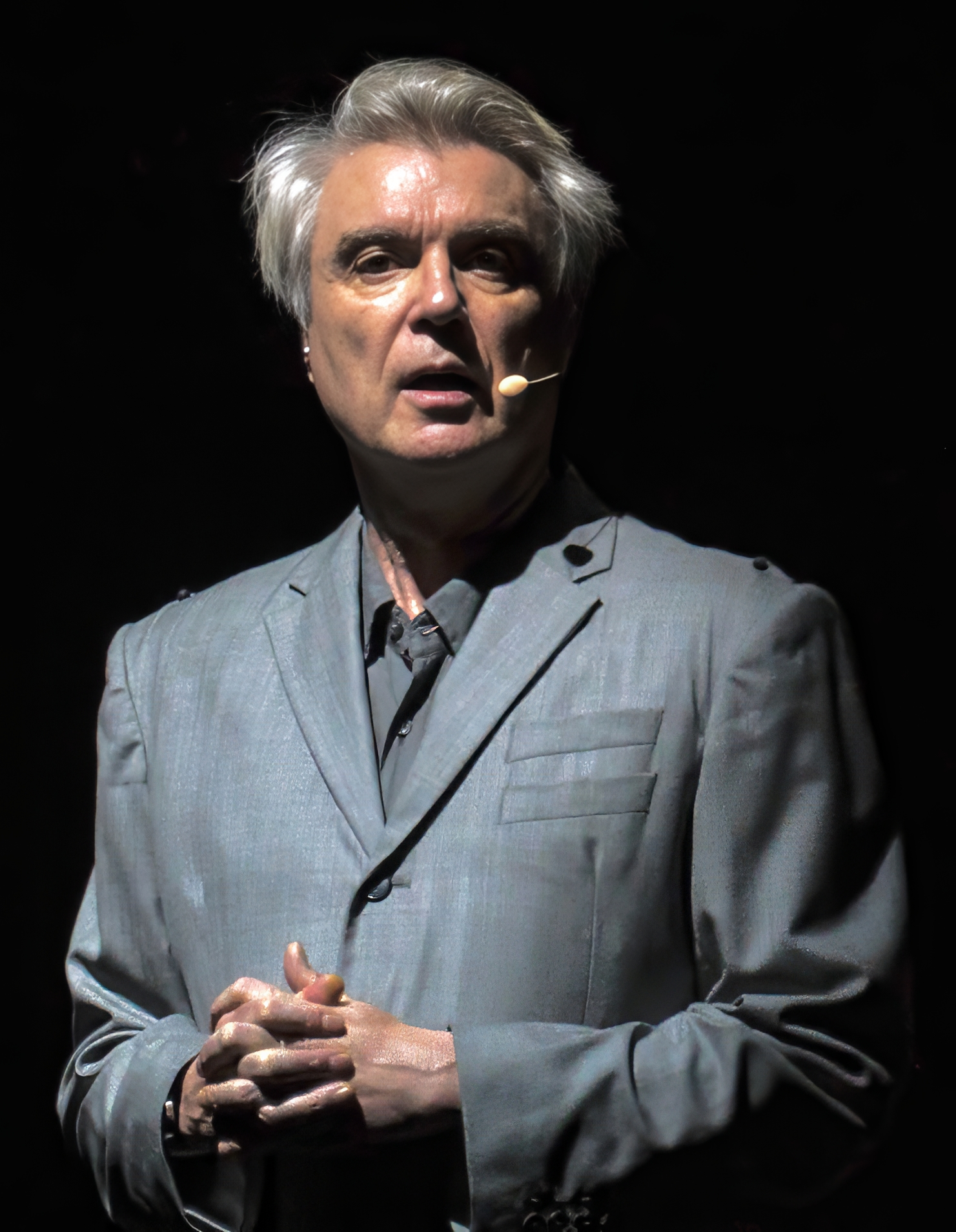 DByrneSDiego120418-12